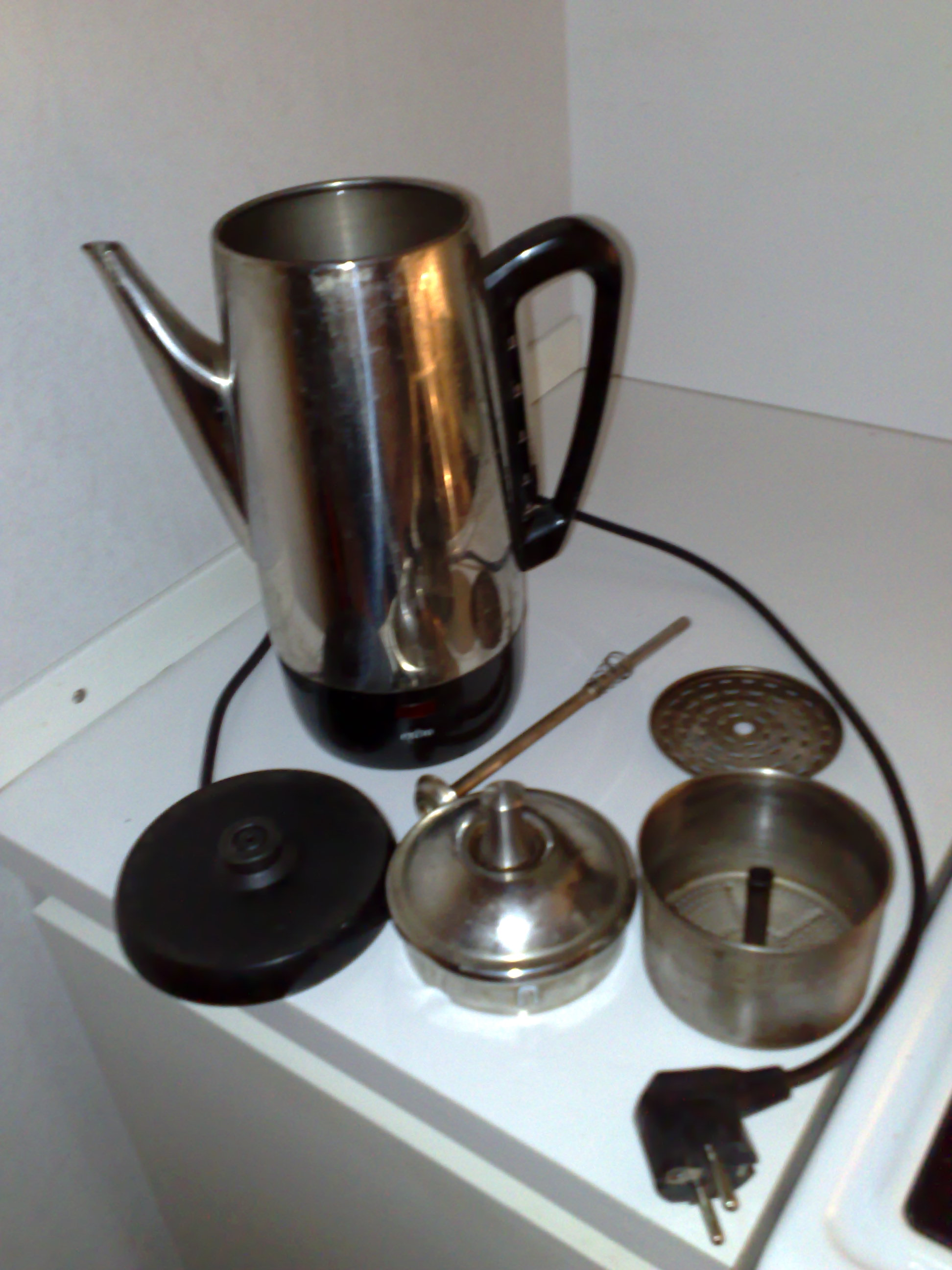 Perkulator med tillbehör